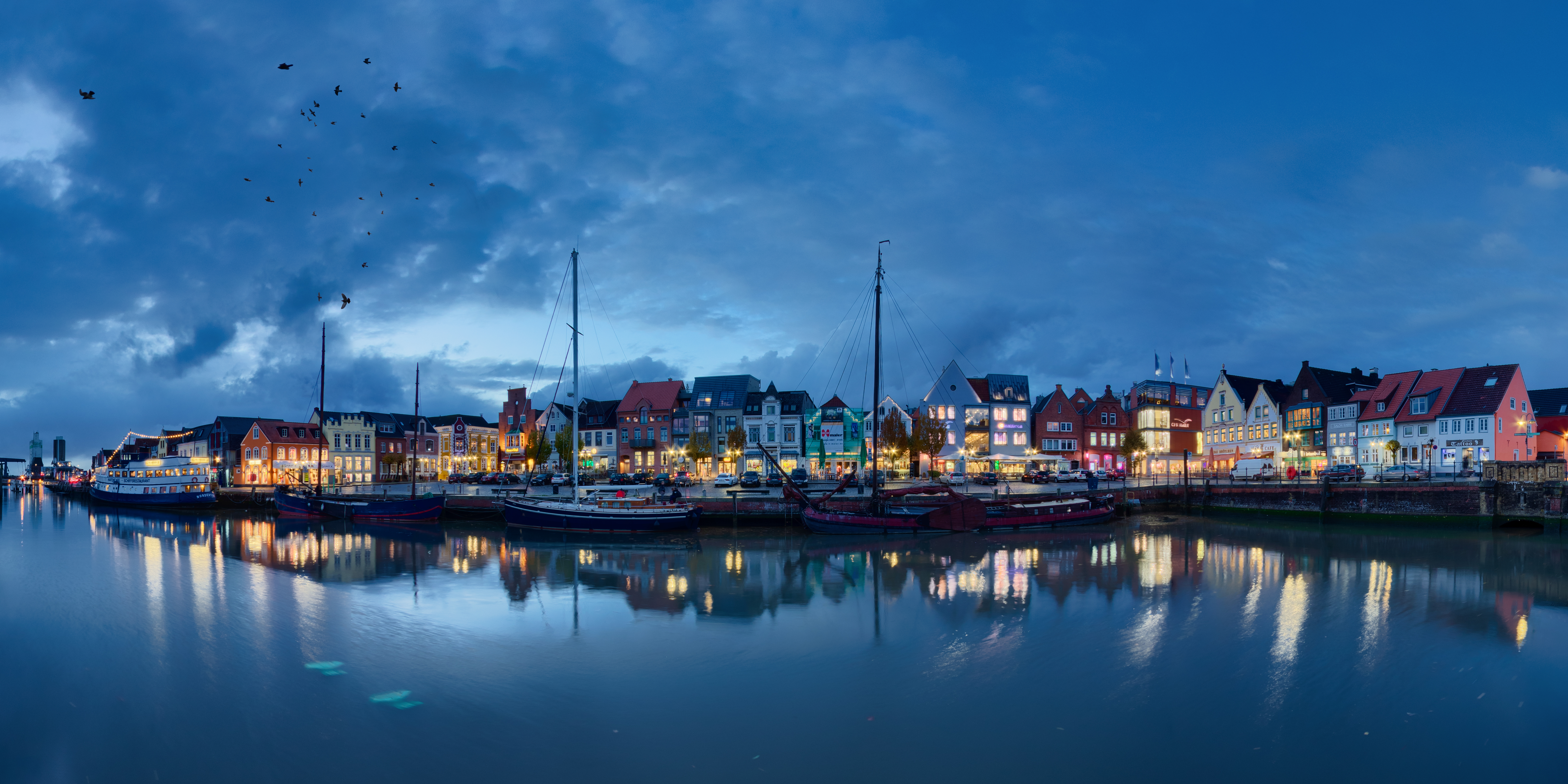 Husum Hafen Panorama zur blauen Stunde